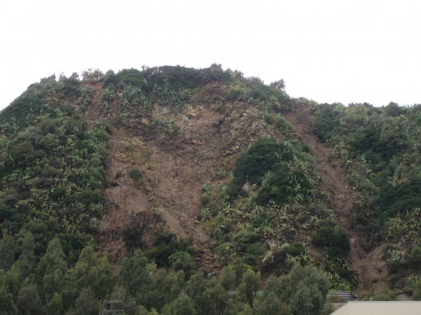 Giampilieri mudslide